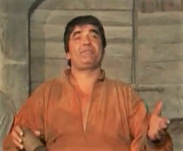 Miale